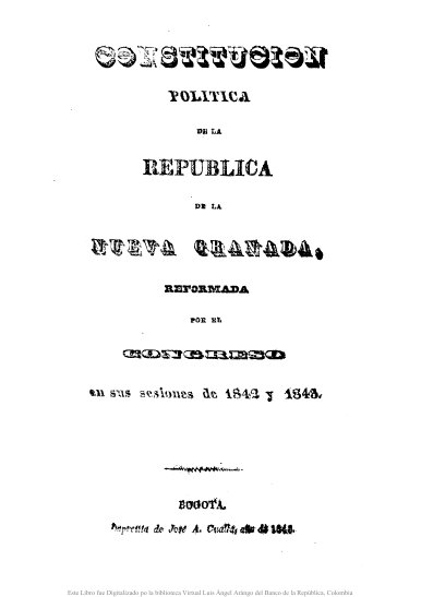 Constitución política de la República de Nueva Granada de 1843